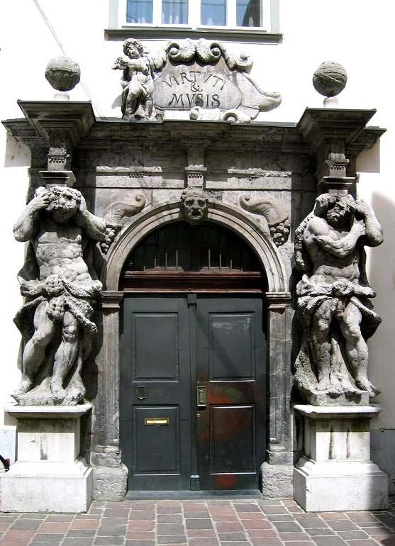 A portal at Ljubljana Seminary author:Ziga 06:10, 26 April 2006 (UTC)